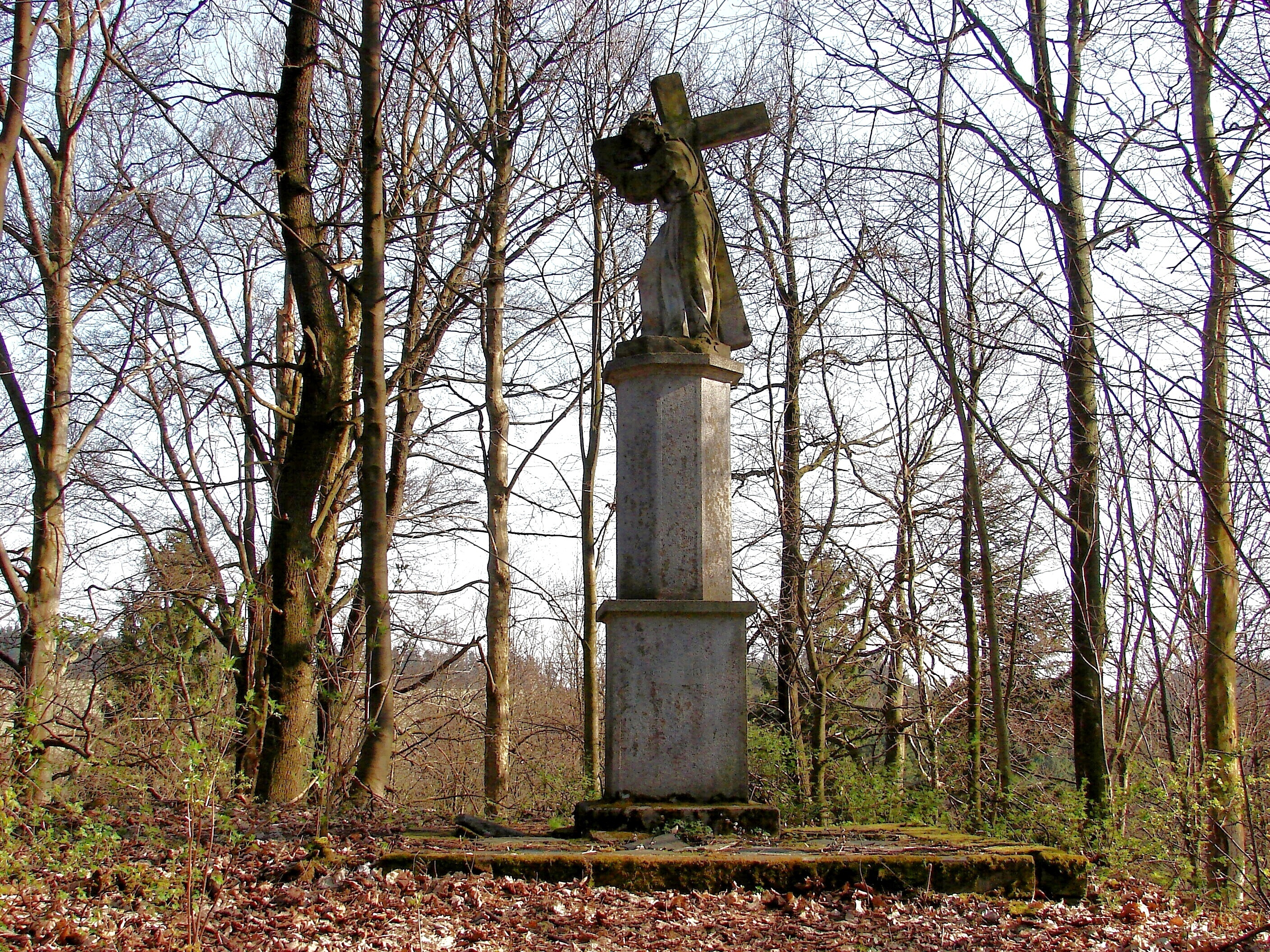 Socha Krista v Lipině (Olomouc)